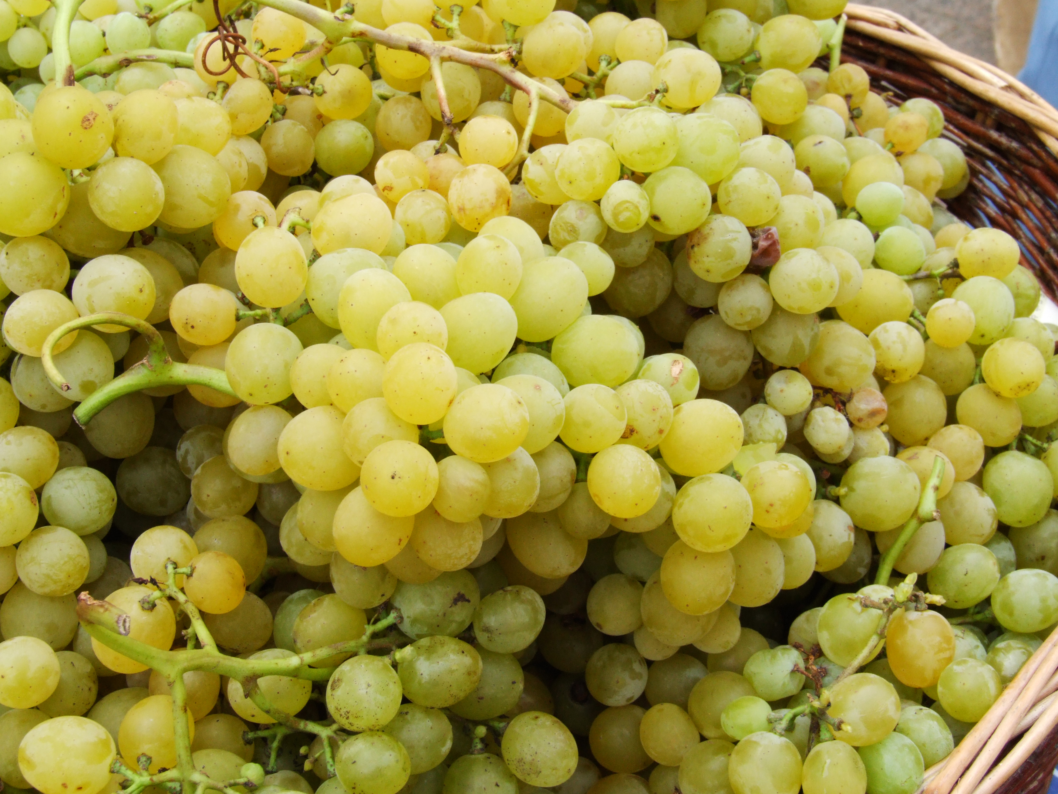 Many grapes: Palatina / Eine weiße Tafeltraubensorte: Palatina